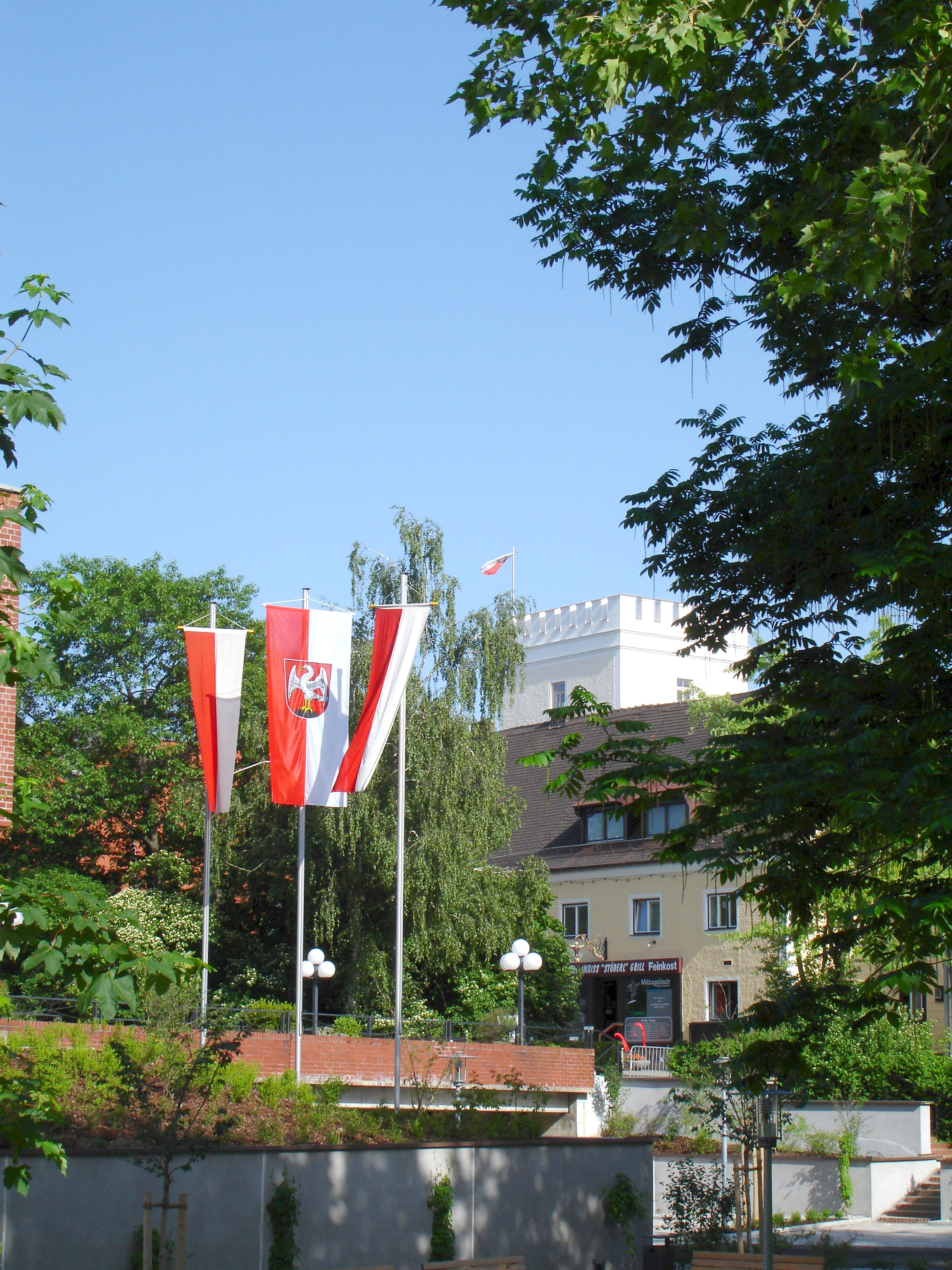 Festbeflaggung anläßlich der 600-Jahr-Feier des Markt Schwabener Wappens vor dem Rathaus. Im Hintergrund, der Wasserturm.